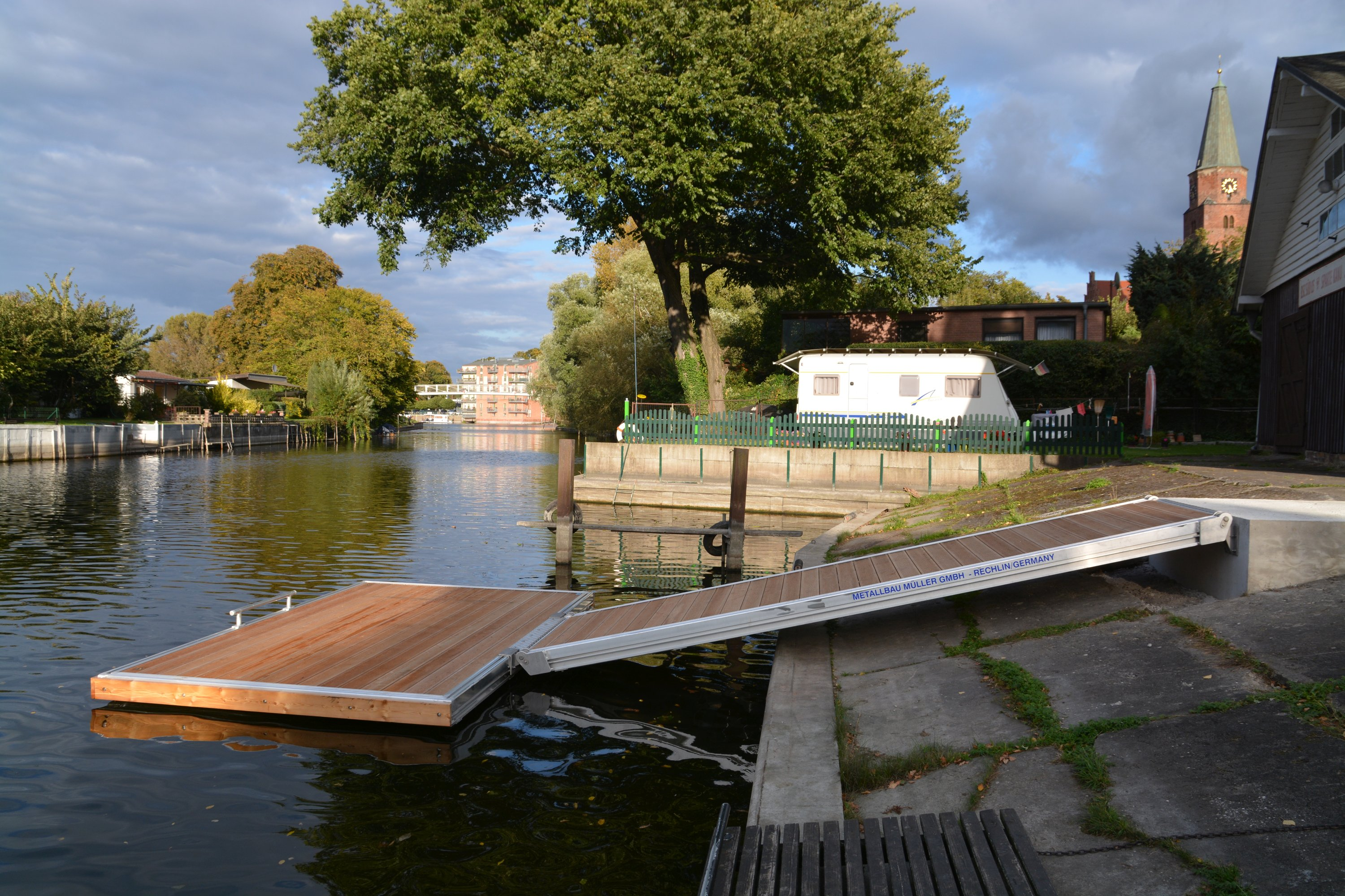 Rudersteg als Schwimmstegkonstruktion